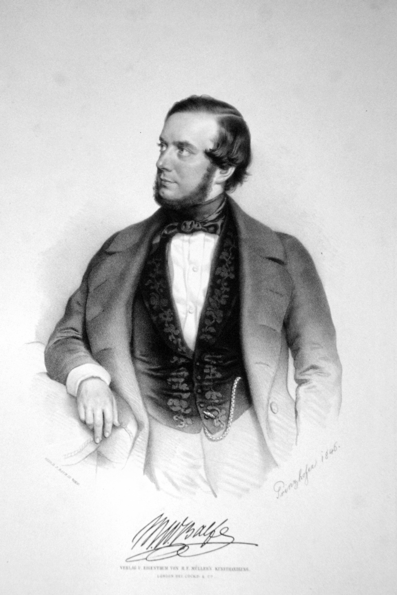 Michael William Balfe, Lithographie von August Prinzhofer, 1846